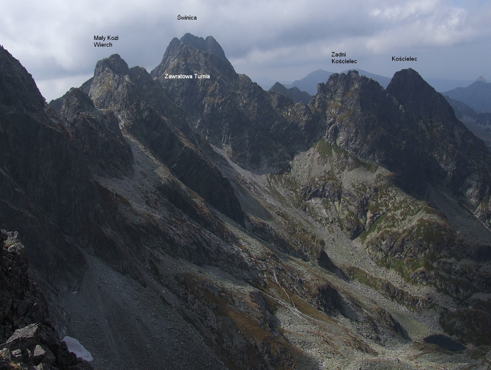 Widok z Czarnych Ścian na szczyty w rerjonie Doliny Gąsienicowej